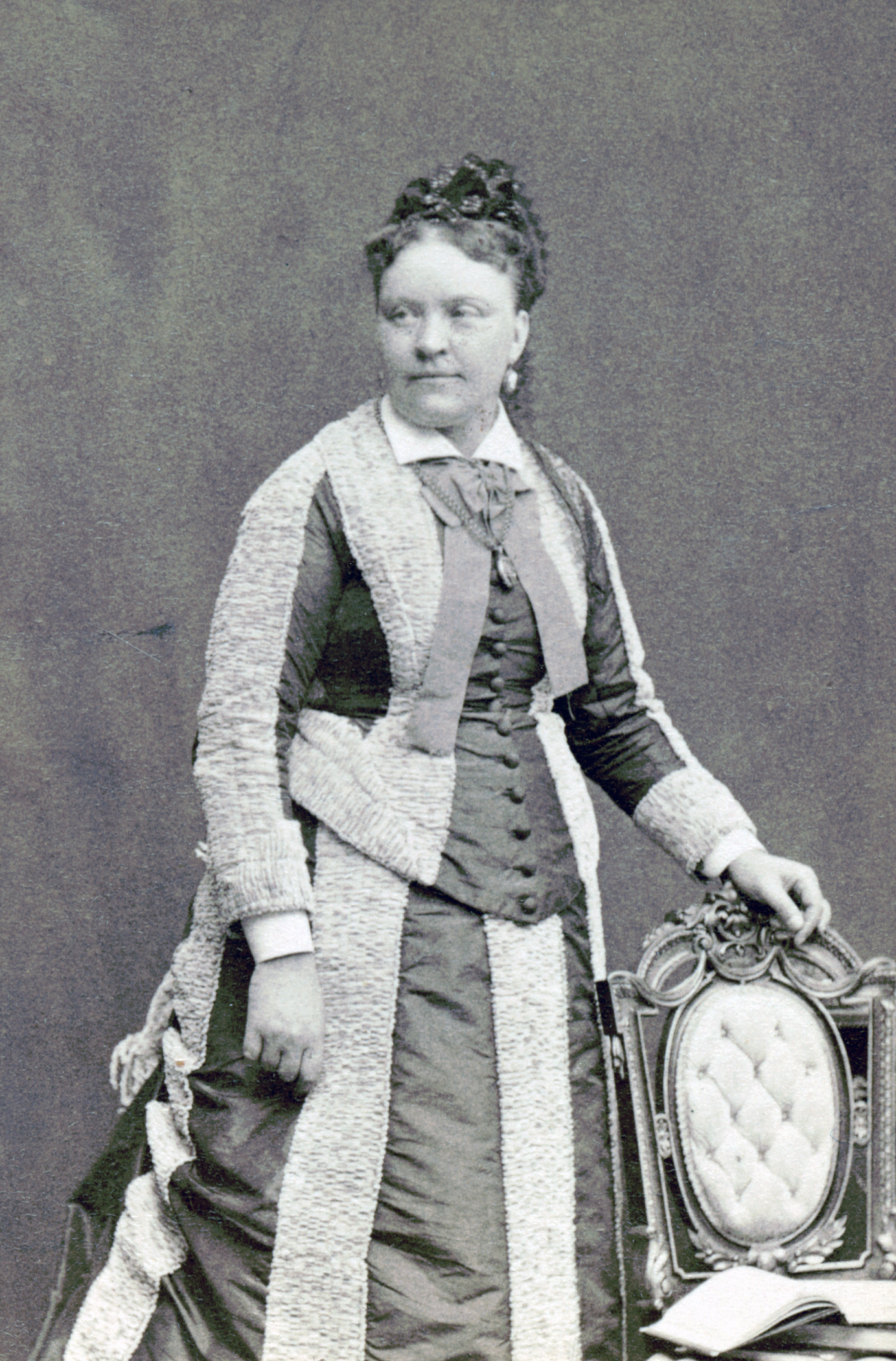 Bertha Tammelin (f. Bock), skådespelare vid Kungliga Dramatiska teatern 1883